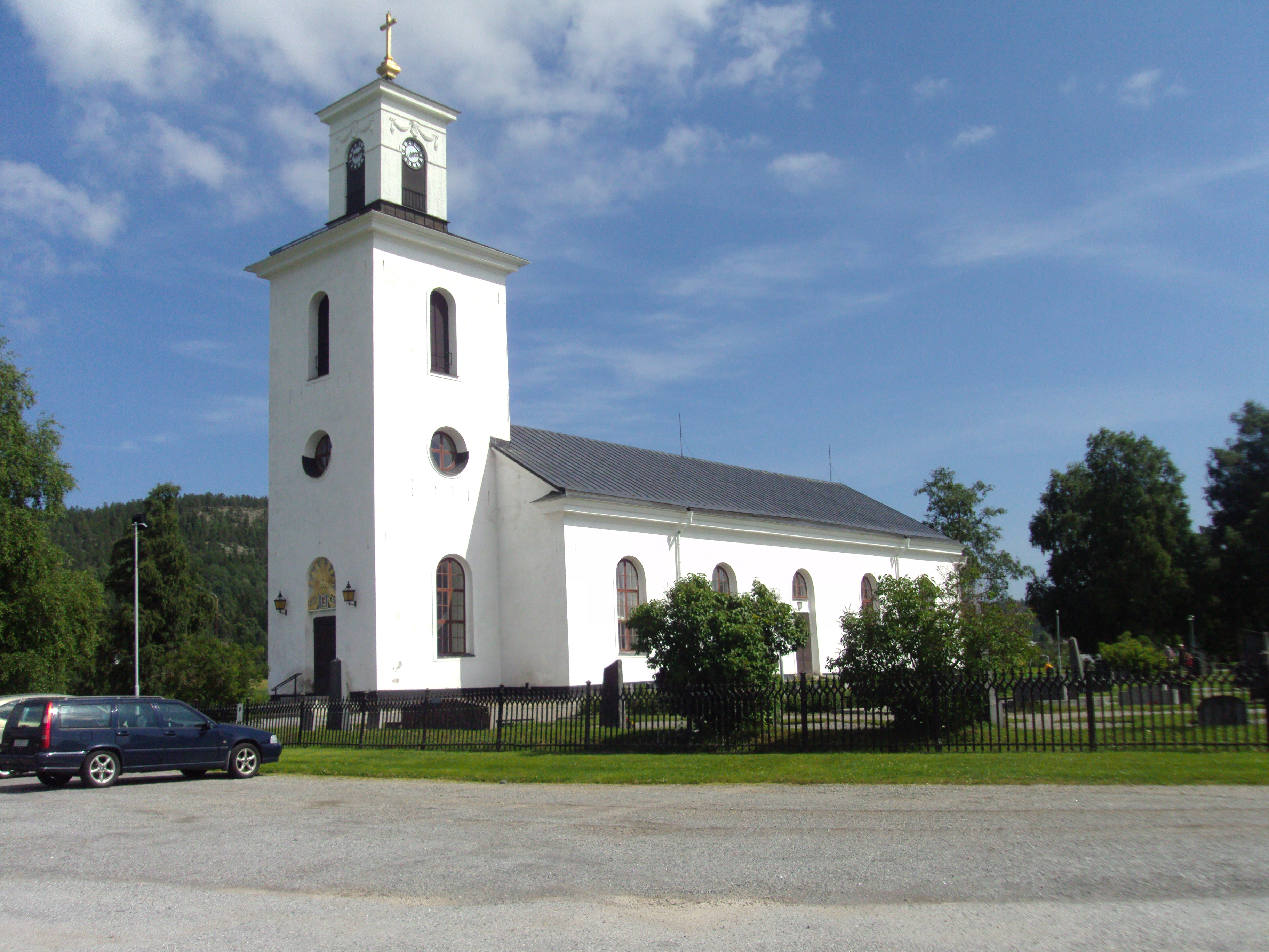 Bjärtrå nya kyrka.